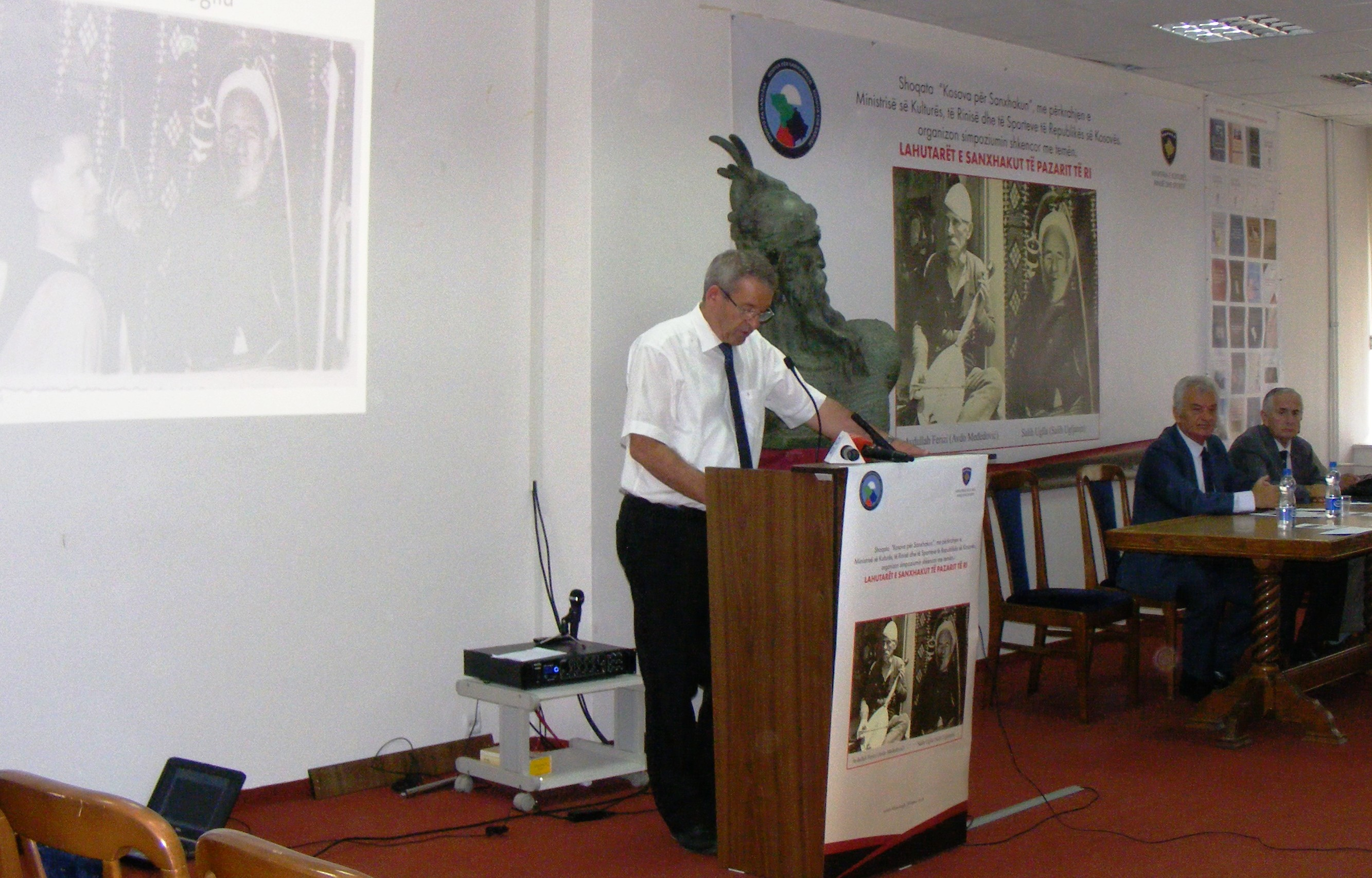 Simpozium Lahutarët e Sanxhakut të Pazarit të Ri